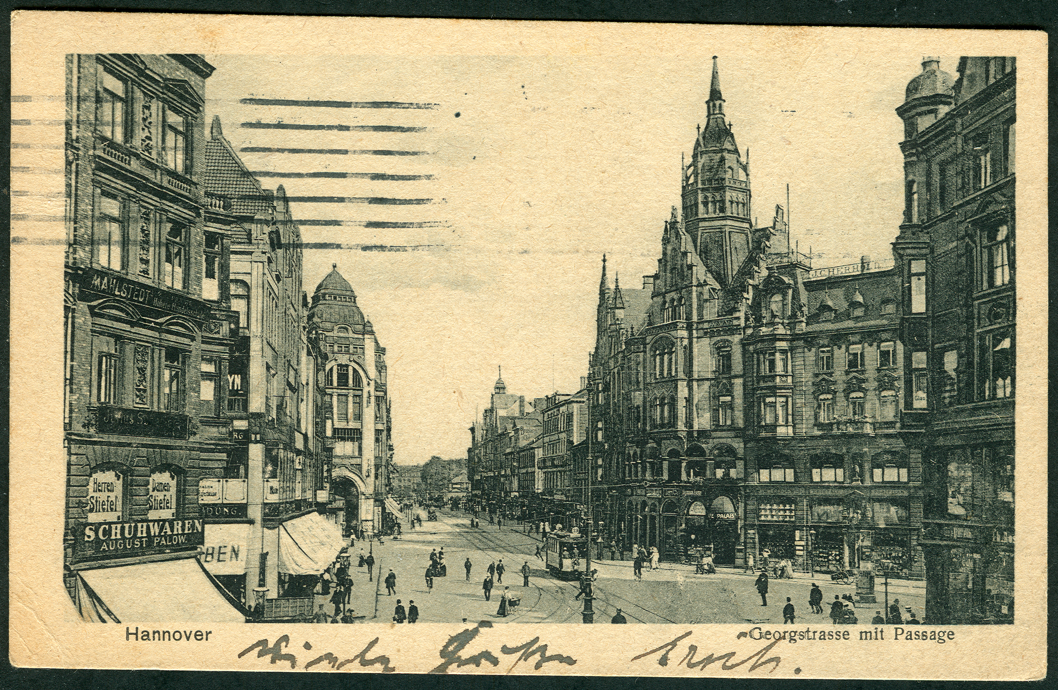 Im Lichtdruck als Ansichtskarte vervielfältigte, aber schief aufgedruckte Aufnahme eines anonymen Fotografen ohne Verlagsangaben (siehe auch die Adressseite der Karte), hier mit einem Blick um das Jahr 1905 von dem spter auch "Steintorhalle" genannten, ehemaligen Gebäude am Schnittpunkt der ehemaligen Nordmannstraße mit der Georgstraße auf das unter anderem von dem Einrichtungshaus Louis Fuge genutzte Drachentöterhaus an der Querung mit der Schillerstraße ...